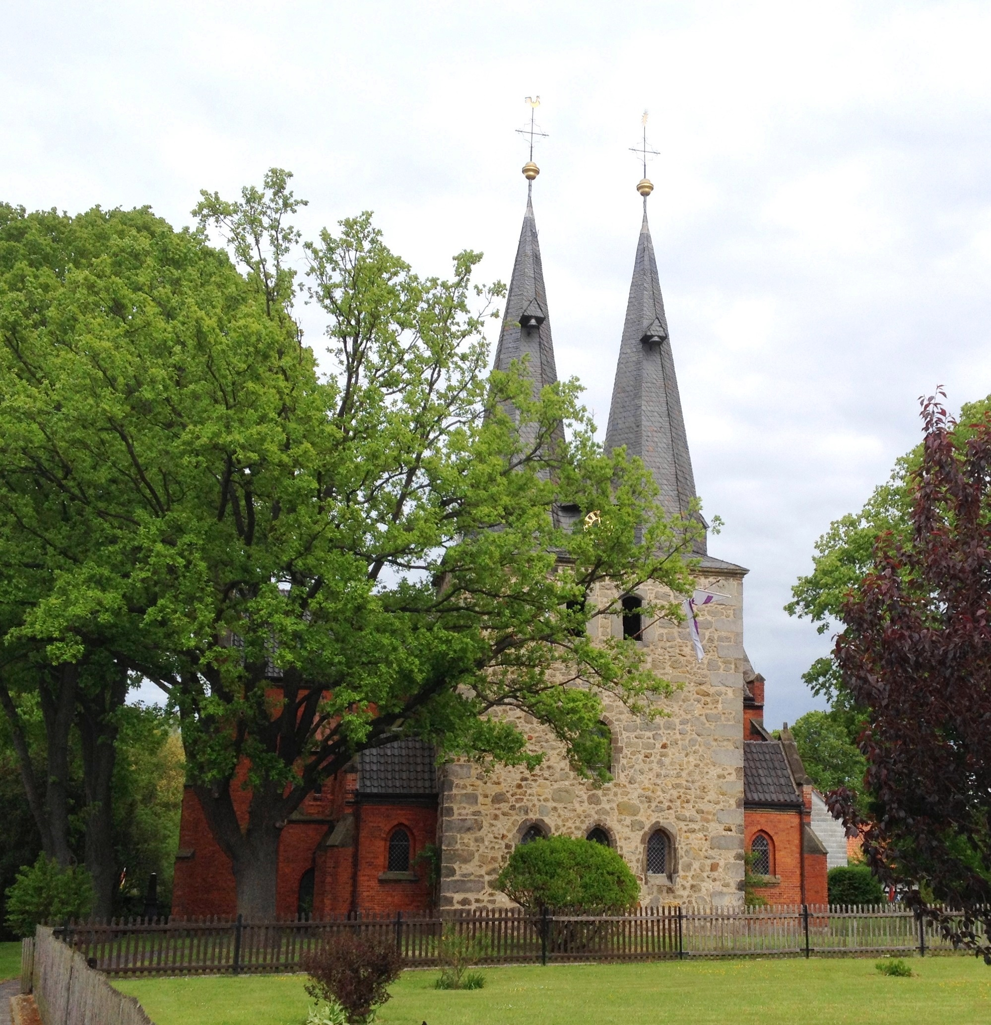 Liebenburg, ev.-luth. Kirche St. Trinitatis